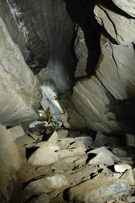 Korallgrottan